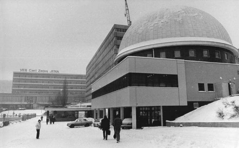 VEB Carl Zeiss Jena, Gebäude ADN-ZB Kasper 19.1.1987 Bez. Gera: Ein Lasershowgerät für das Berliner Planetarium ist jetzt in der neuen Astrojustierkuppel (Foto) des Kombinates VEB Carl Zeiss Jena getestet worden. Planmäßig gehen die Arbeiten für das in der DDR-Hauptstadt entstehende moderne Sternentheater voran.